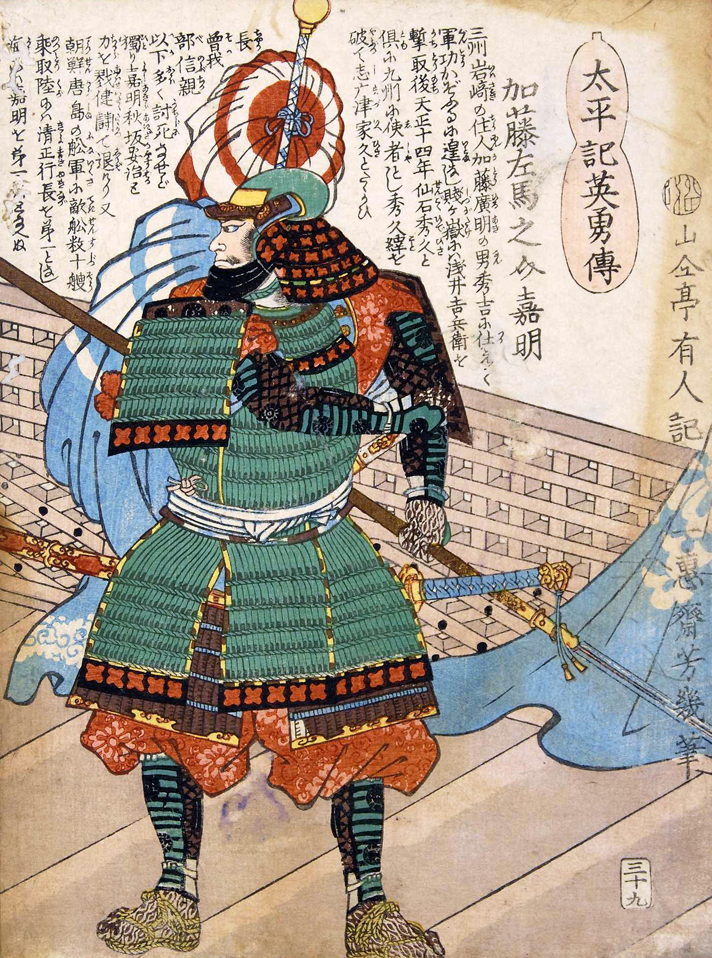 太平記英勇伝「三十九、加藤左馬之介嘉明